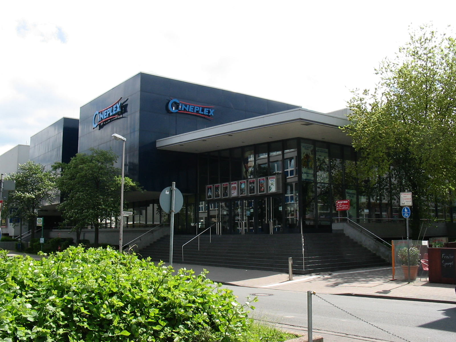 Cineplex Kino Hamm